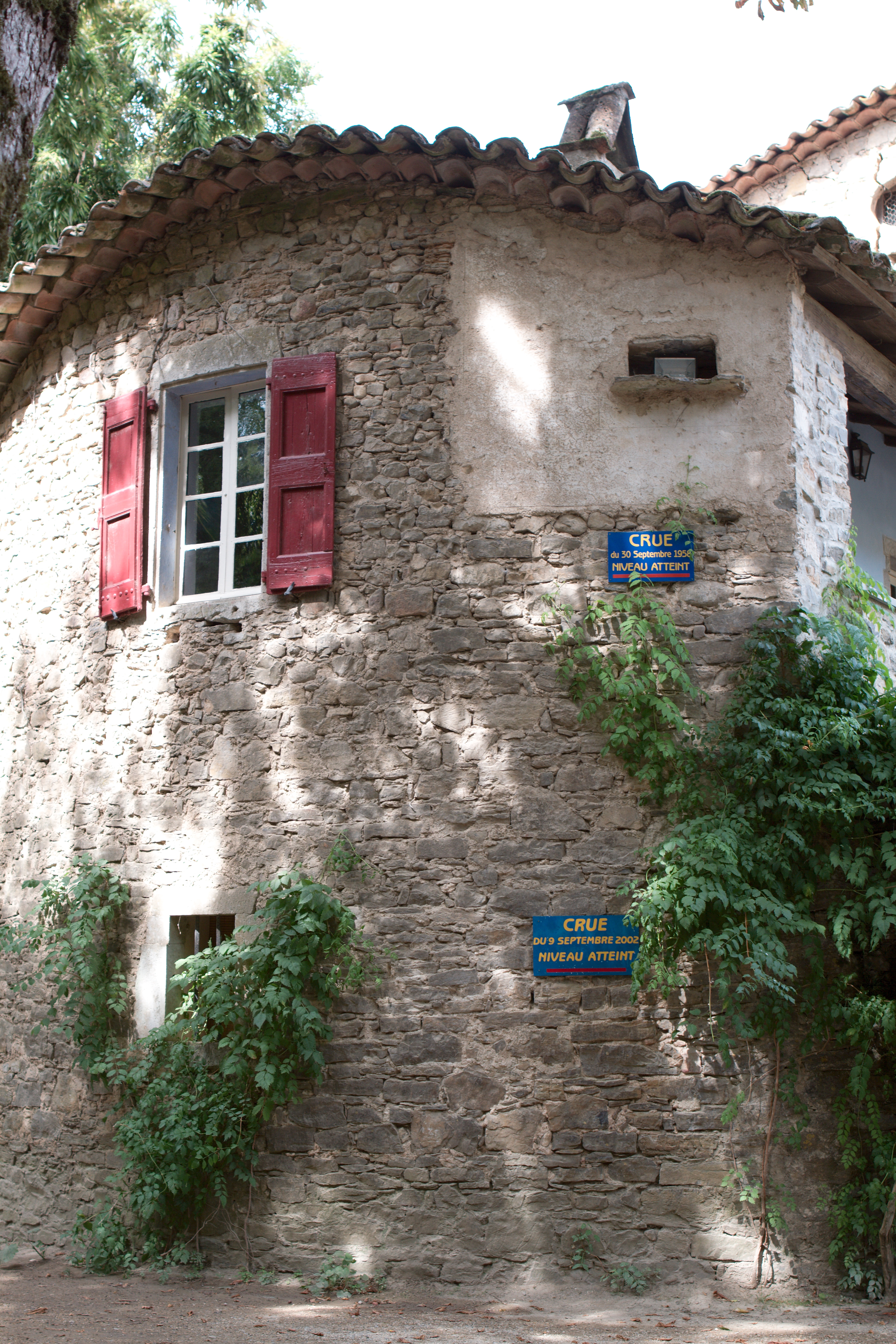 Ferme de la Bambouseraie de Prafrance (Gard, France) avec les marques d'inondation de 1958 (en haut) et 2002.